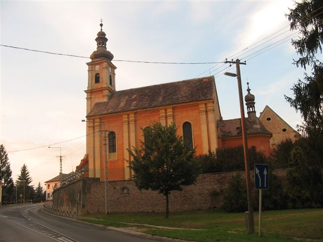 andocsi Nagyboldogasszony római katolikus templom